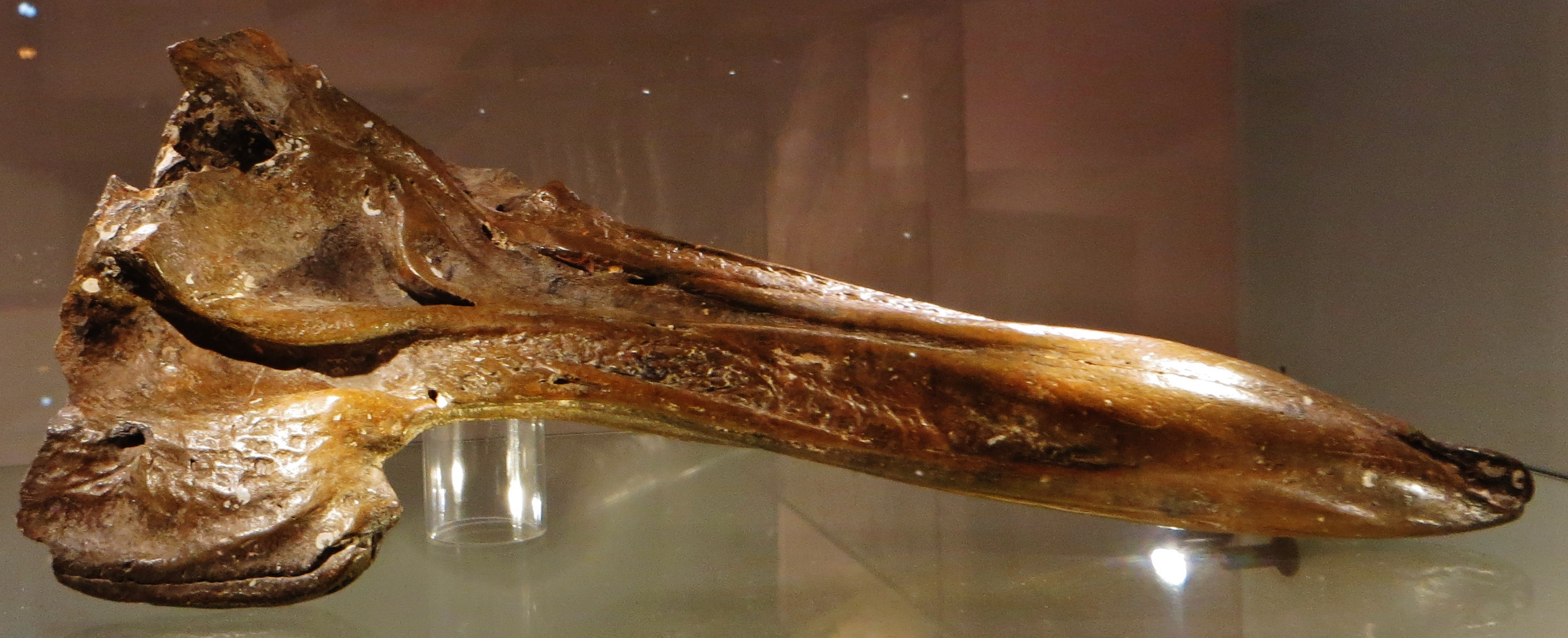 Fossil of Choneziphius - Took the picture at Naturalis, Leiden